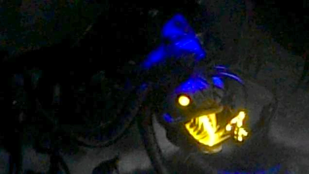 Partie du décor lors de l'interprétation de Paparazzi au Monster Ball.